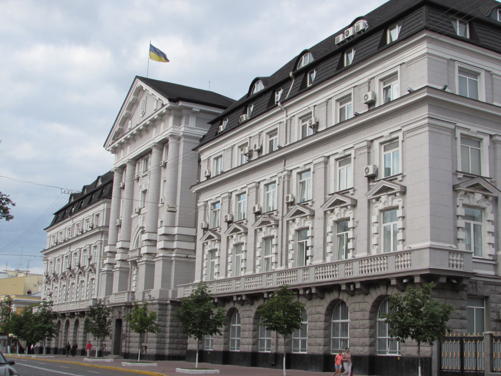 Будинок Губернської Земської управи, Київ, Володимирська вул., 33